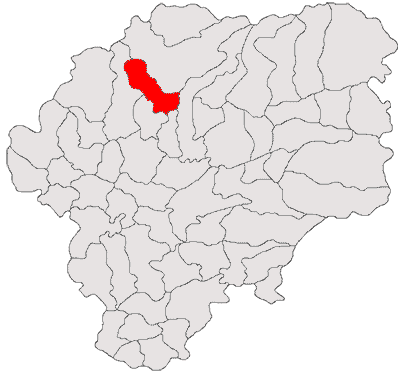 Categorie:Hărţi ale judeţului Bistriţa-Năsăud